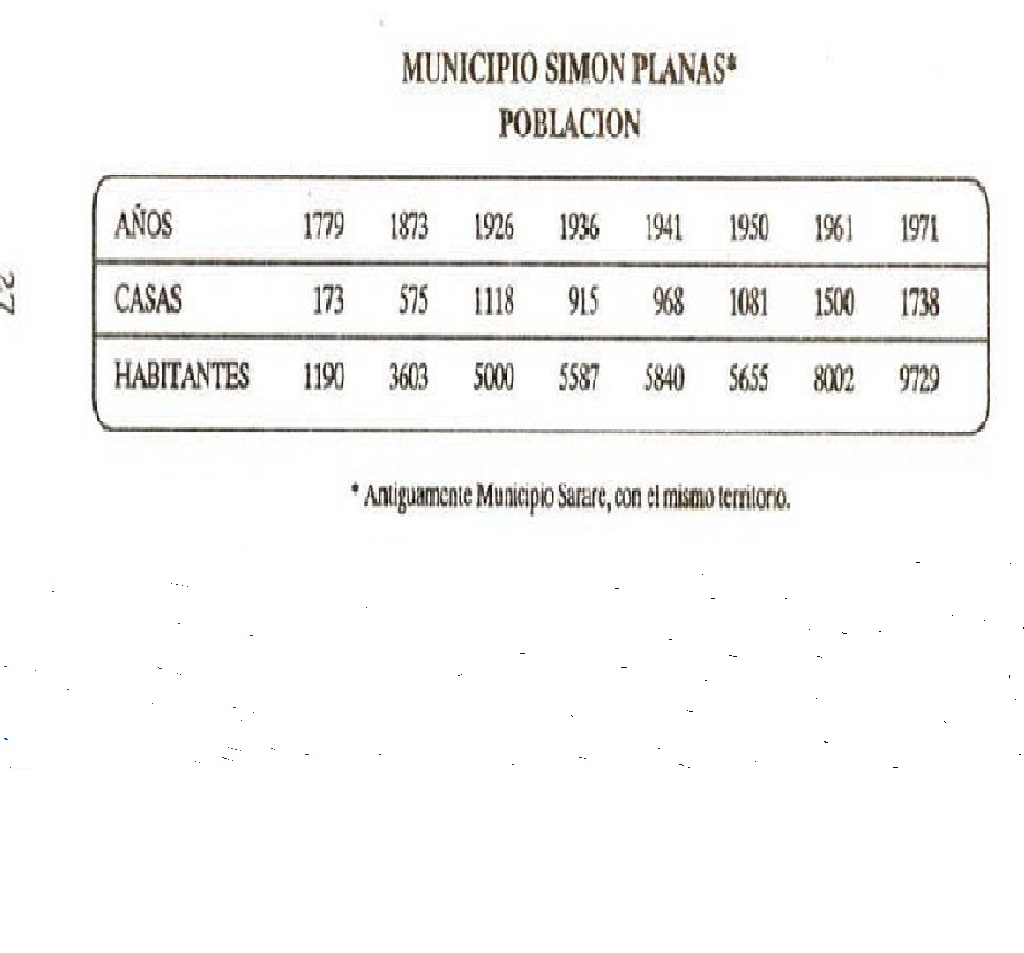 numero de habitantes del municipio Simón Planas por años